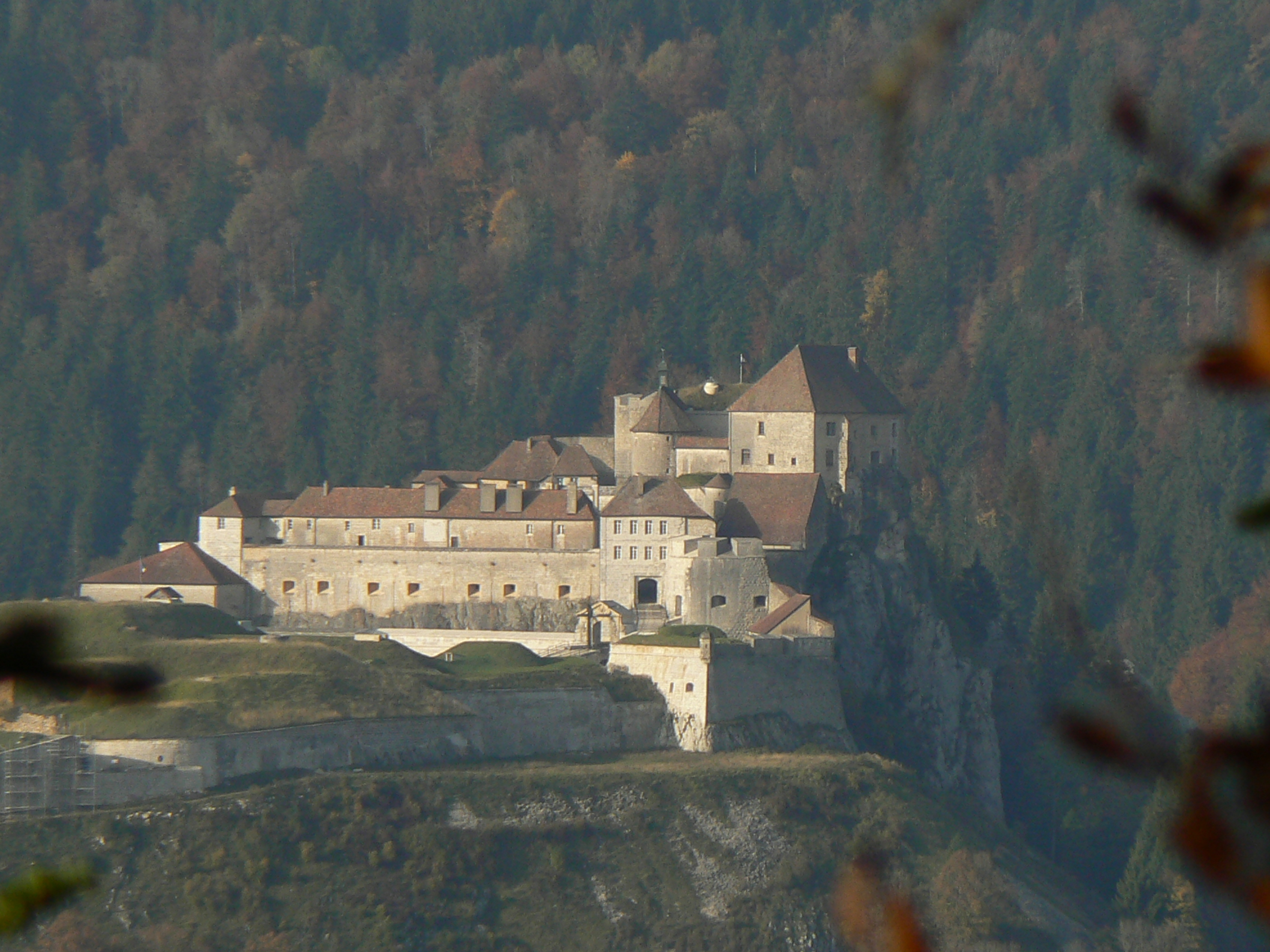 Vue Sud Ouest du fort de Joux